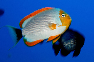 Genicanthus personatus, macho